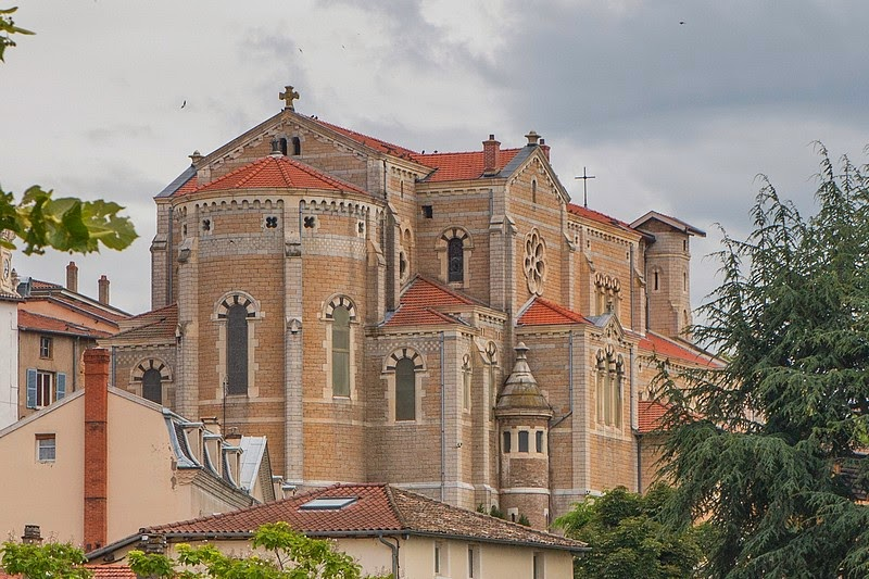 Église Saint Symphorien de Trévoux dans l’Ain, 2014